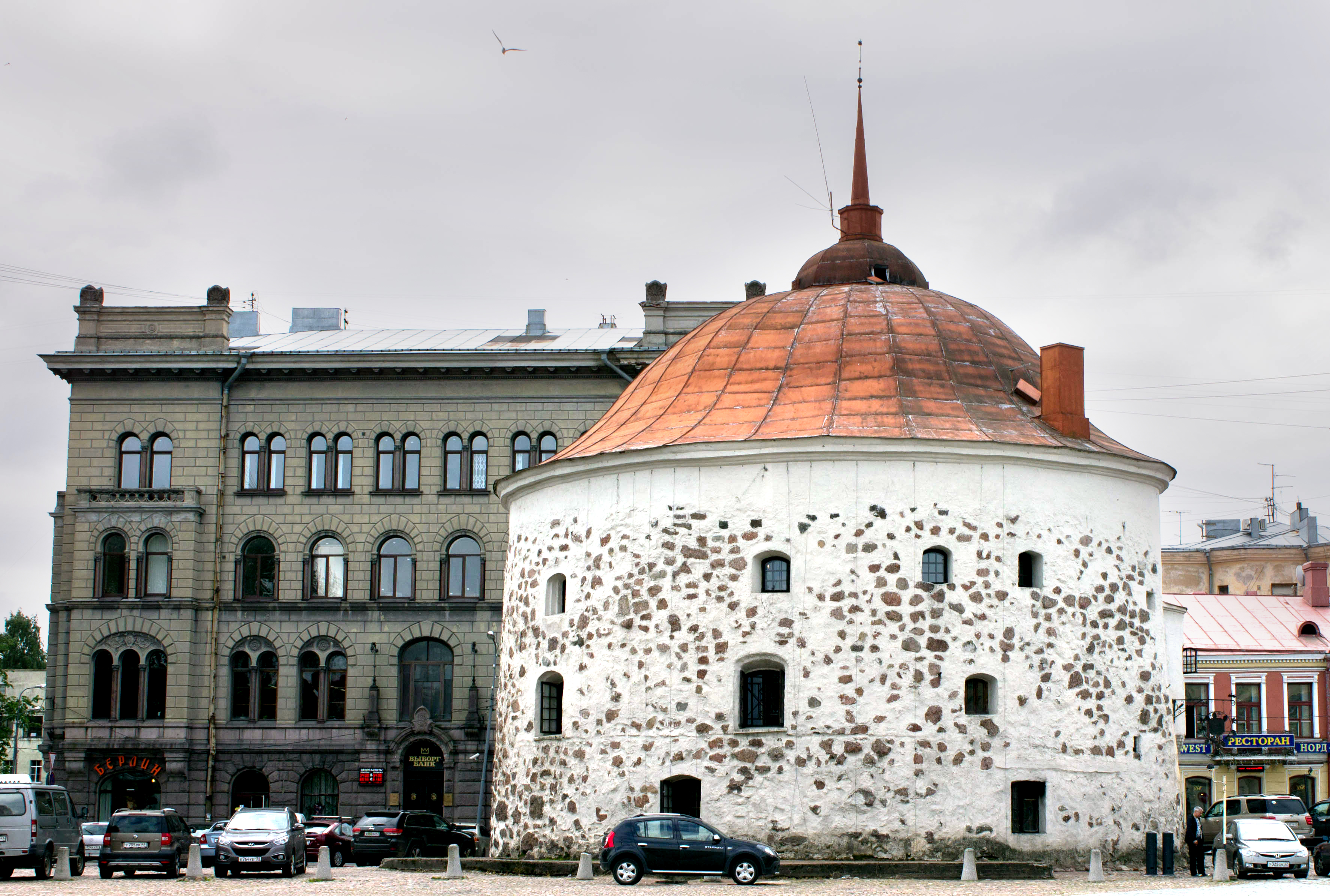 Башня Круглая: площадь Рыночная, Выборг, Выборгский район, Ленинградская область